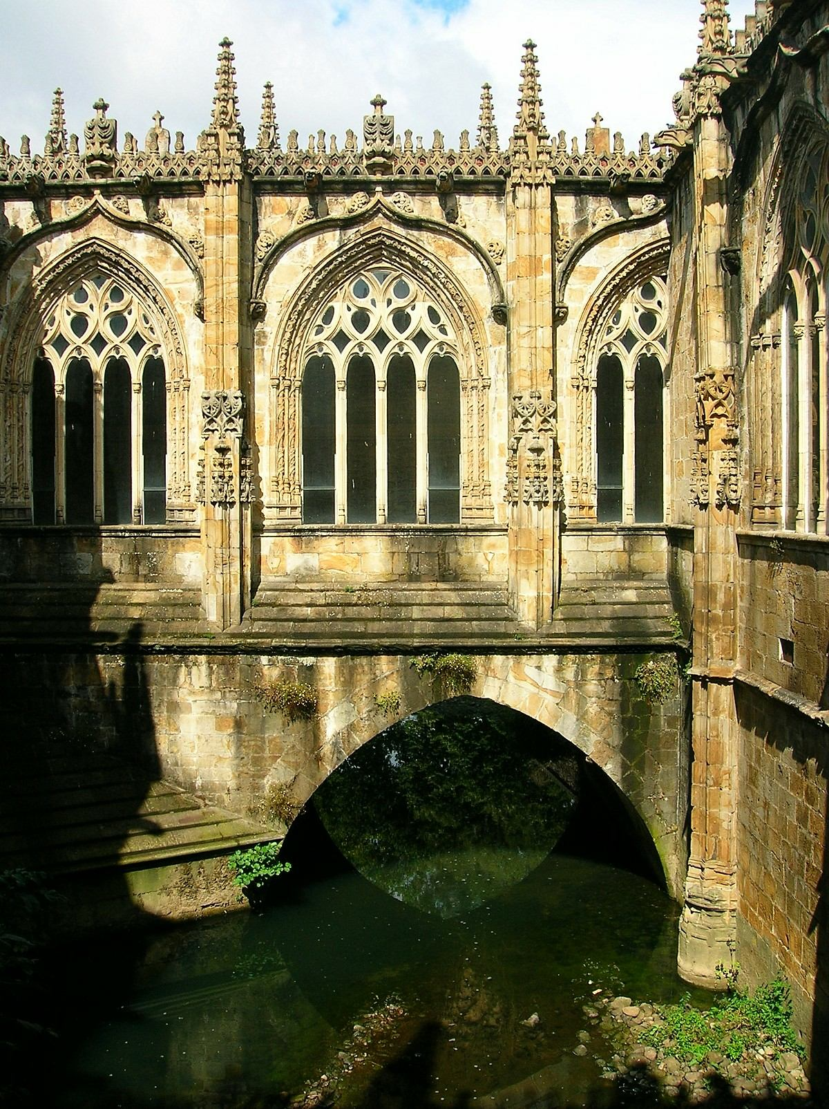 Claustro de la Iglesia de San Miguel Arcángel, Oñate (Guipúzcoa)